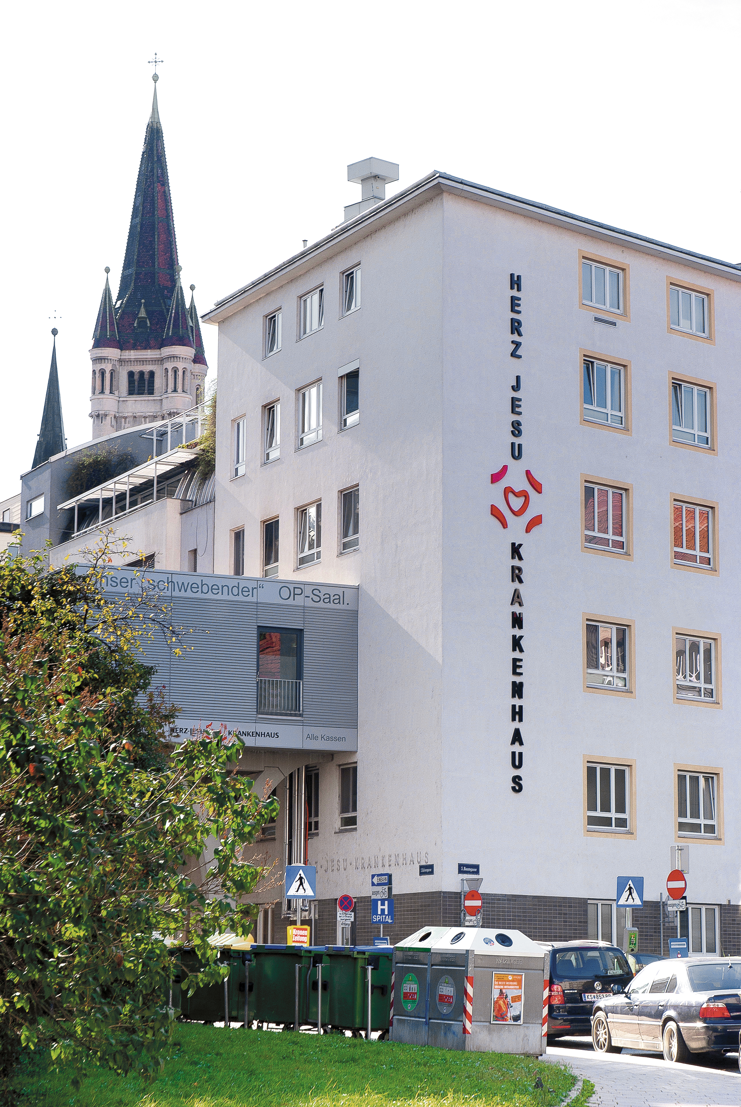 Herz-Jesu Krankenhaus mit schwebendem OP-Saal